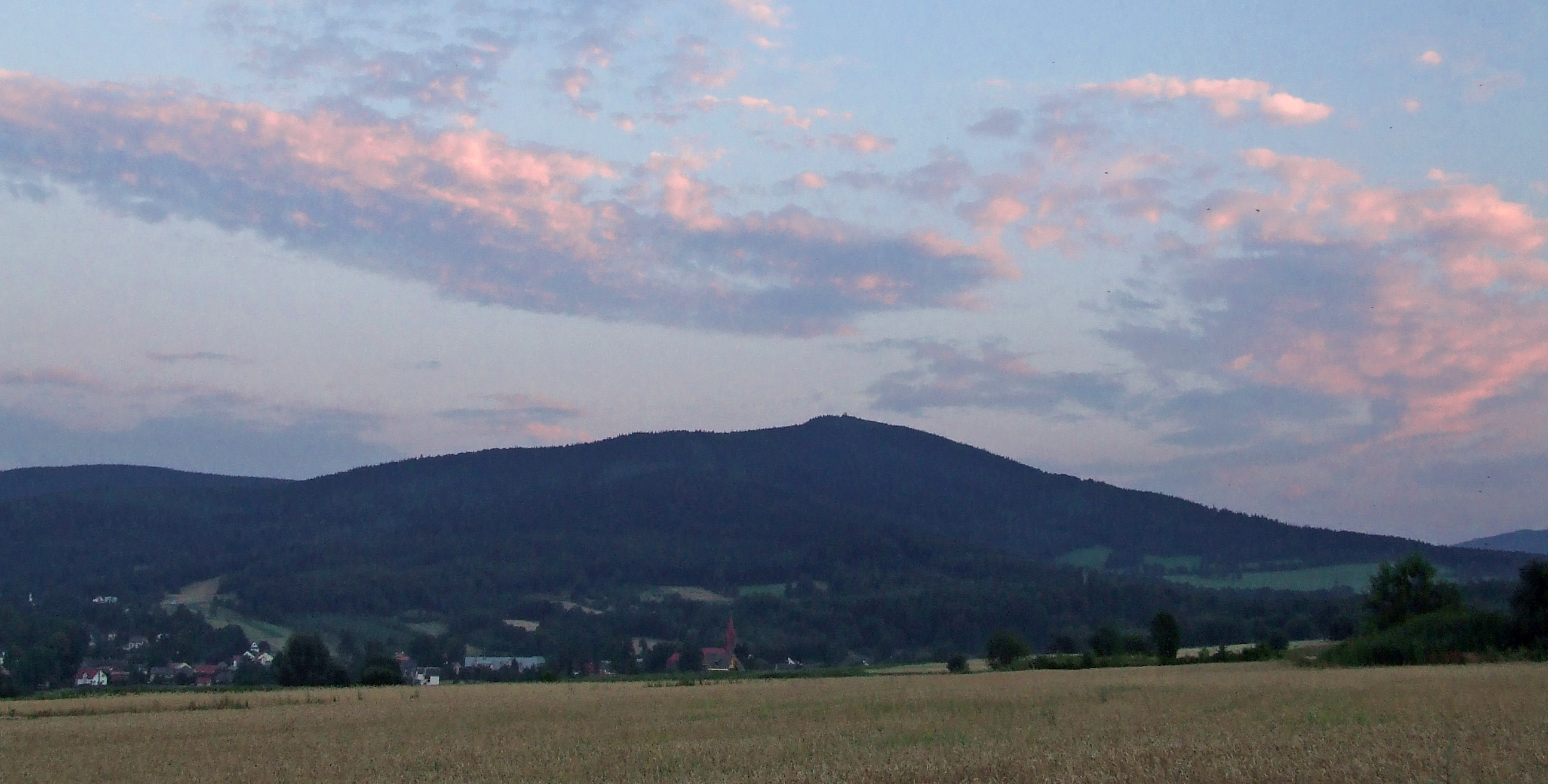 Biskupia Kopa - Najwyższy szczyt Gór Opawskich (889m npm)